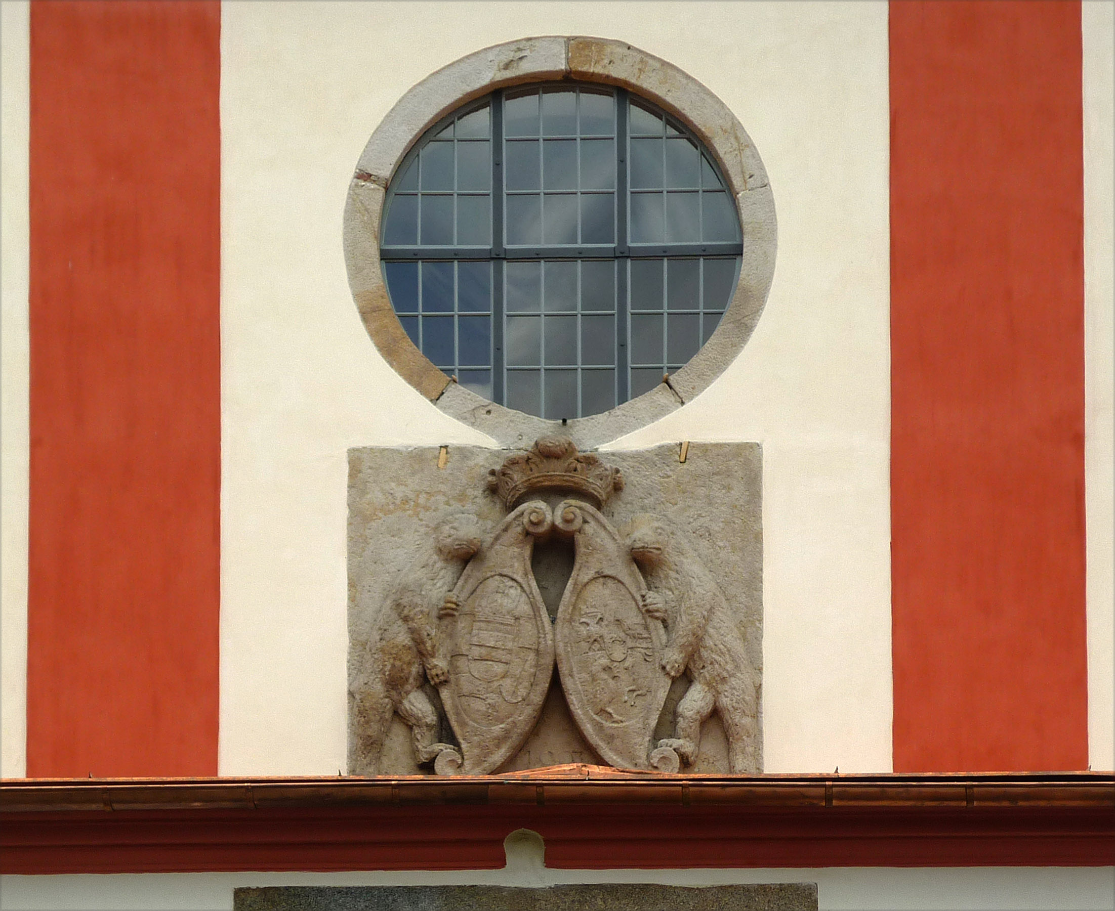 Wappen an der Kirche des Hl. Simon und Judas in Hainspach (Lipová) in Nordböhmen